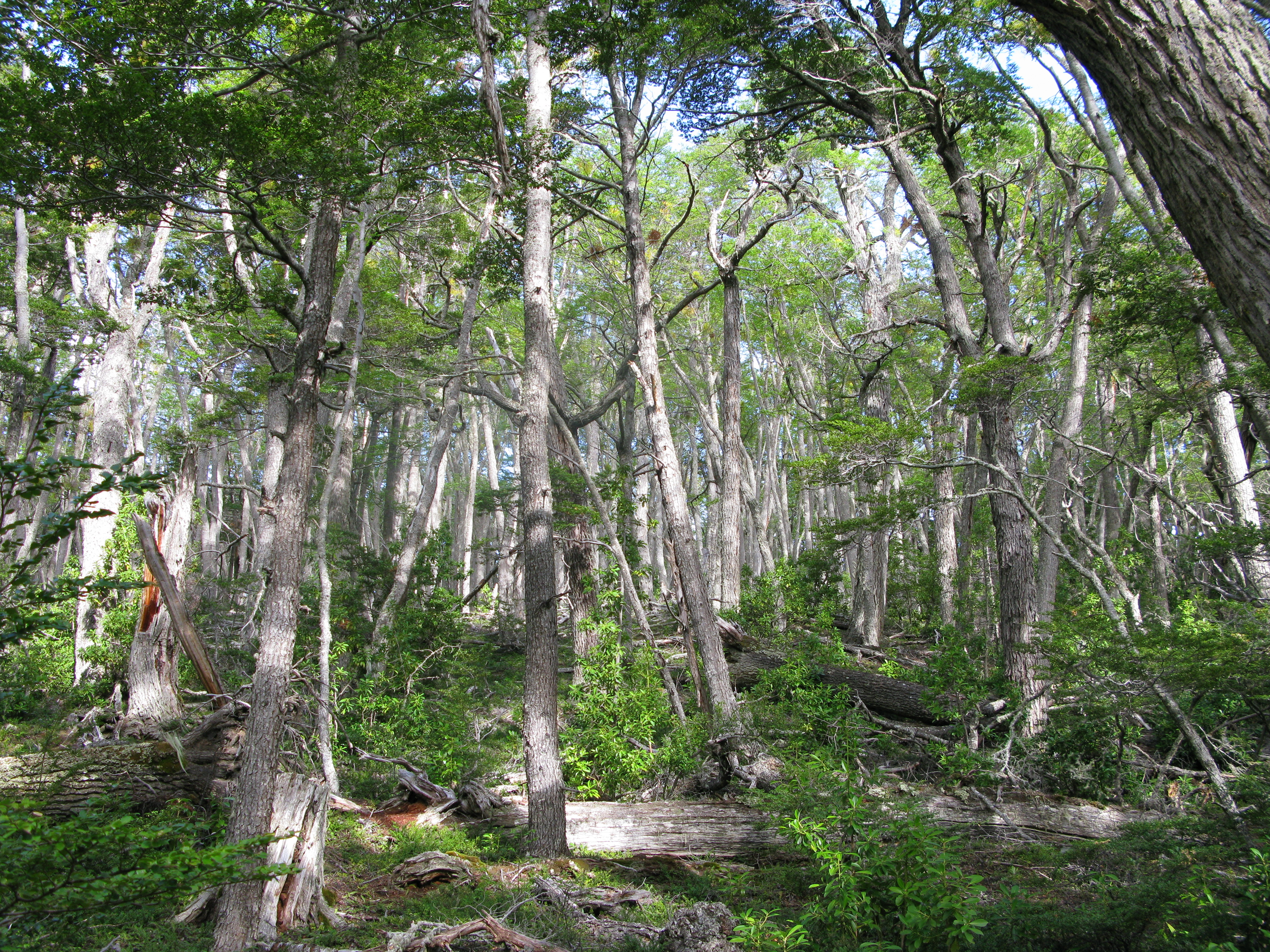 Forêt du Parc national de Terre de Feu